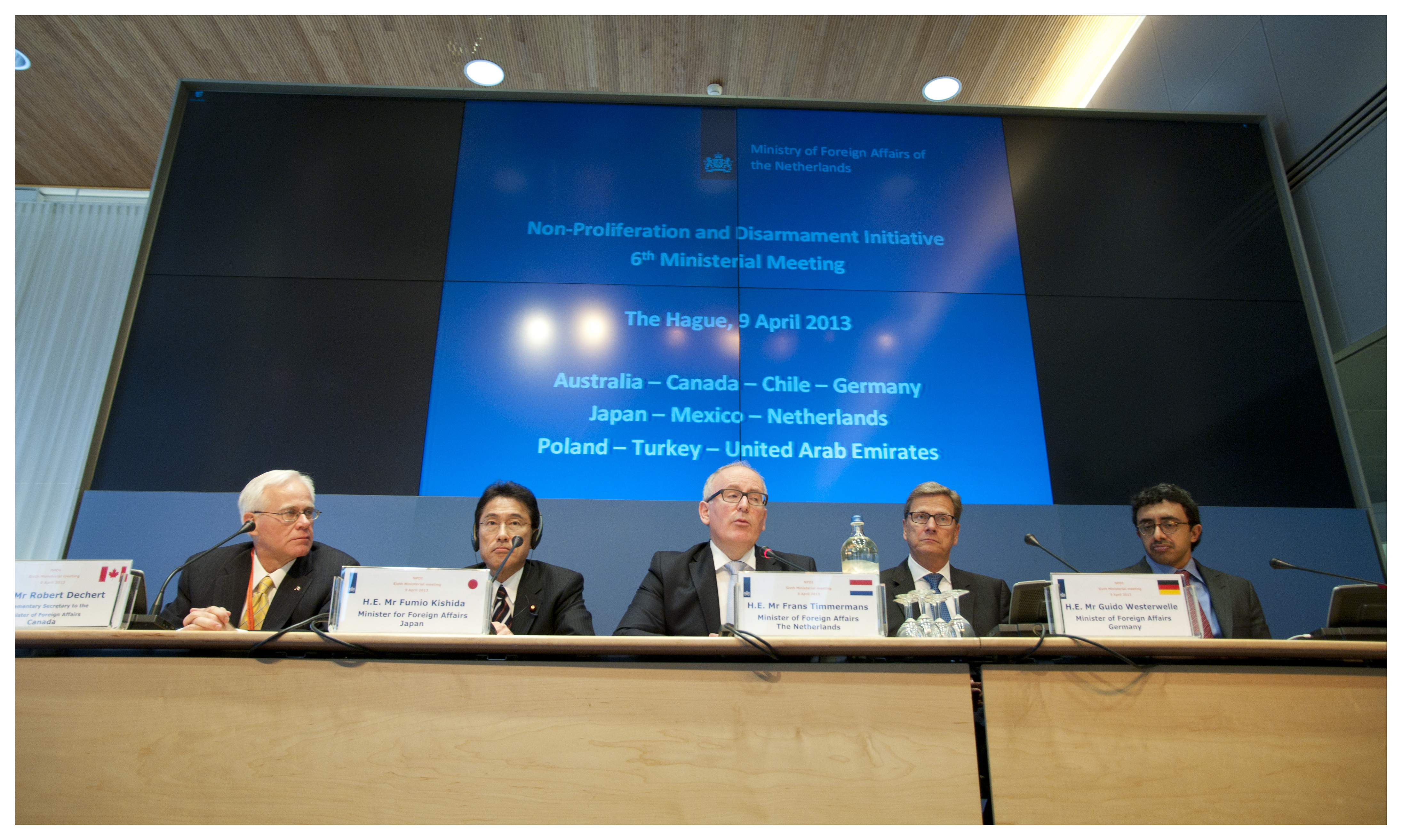 130409 NPDI op BZ 2137